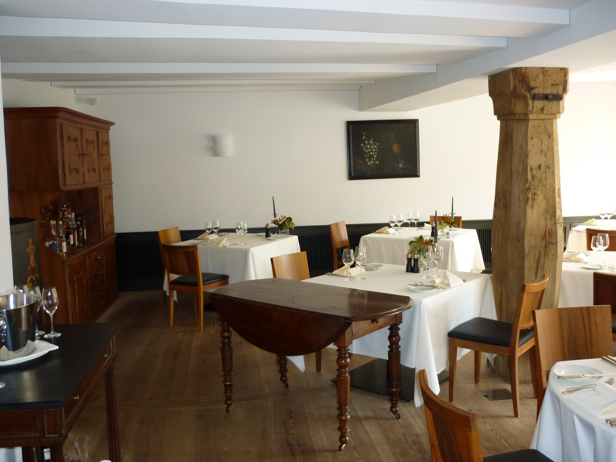 Gasthof Hirschen, Eglisau ZH, Schweiz